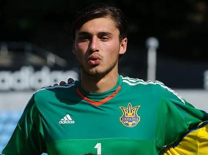 Георгій Бущан у фіналі Турніру пам'яті Валерія Лобановського 2015